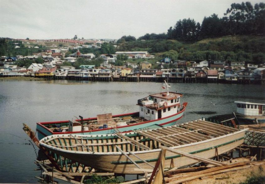 Astilleros en Castro, isla de Chiloé, Chile